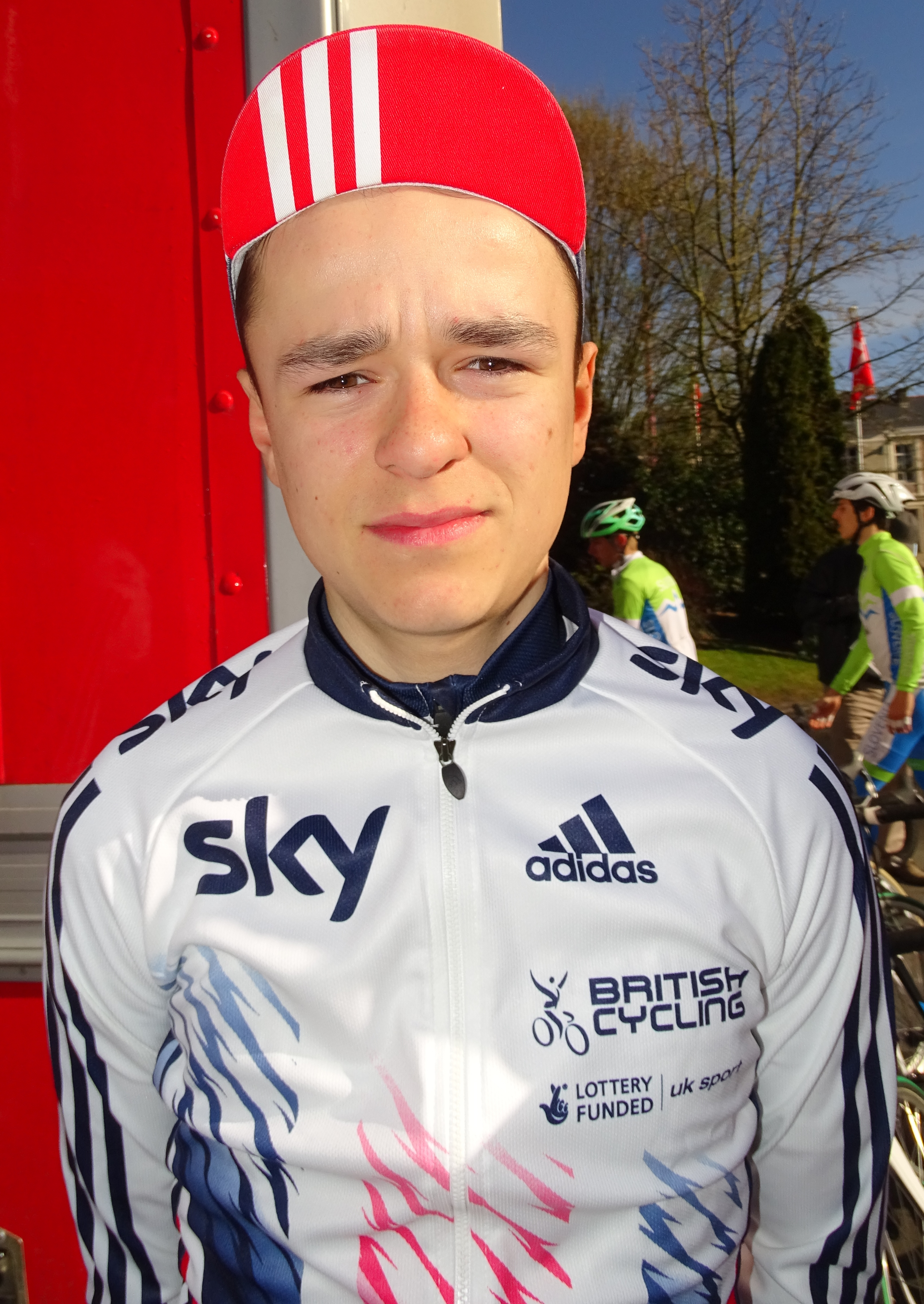 Reportage réalisé le dimanche 10 avril à l'occasion du départ du Paris-Roubaix juniors 2016 à Saint-Amand-les-Eaux, France.